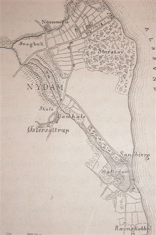 Kort over Nydammose. Nydam Mose. Kort over området.